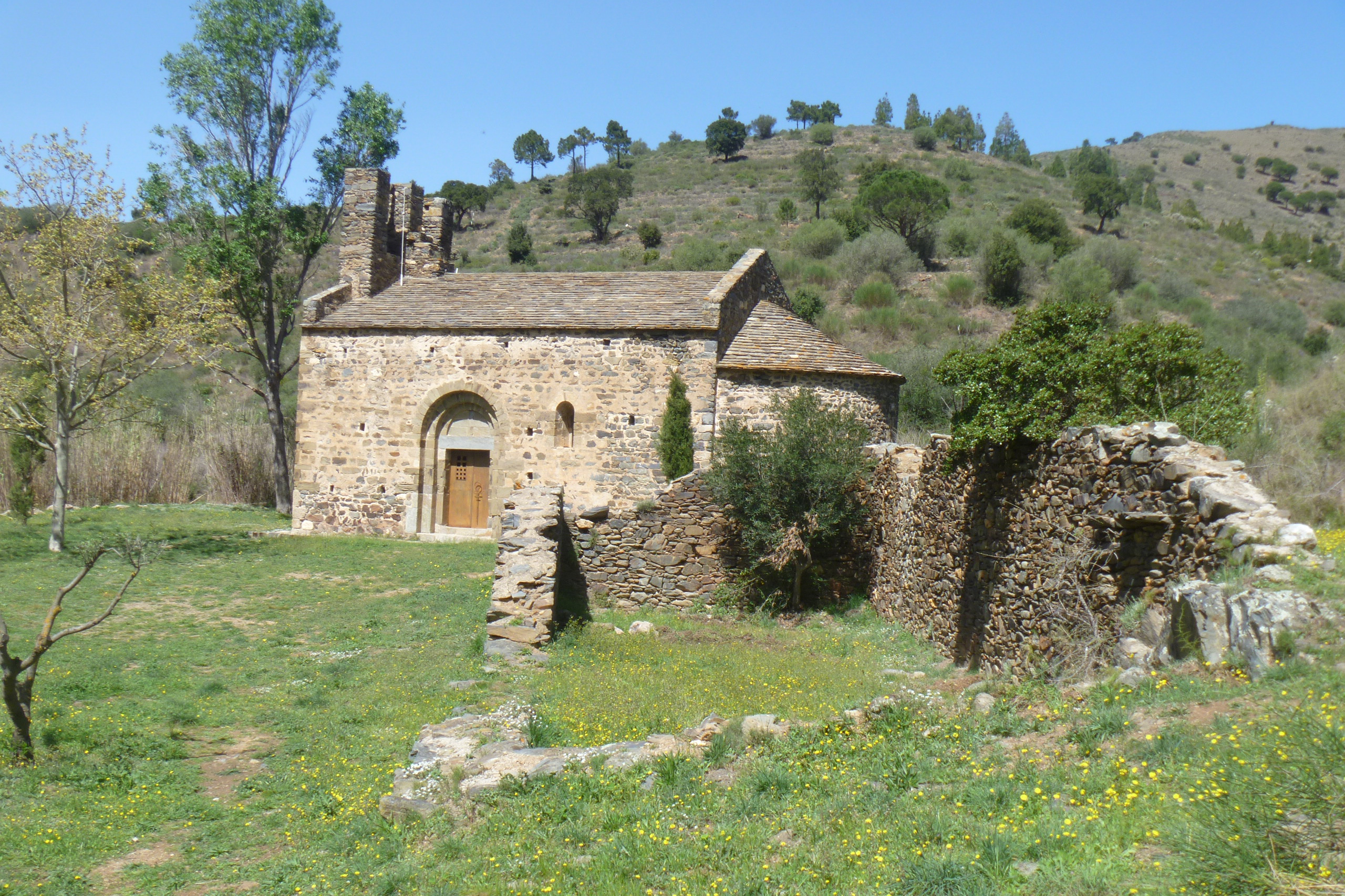 Església de Sant Silvestre de Valleta, a Llançà.